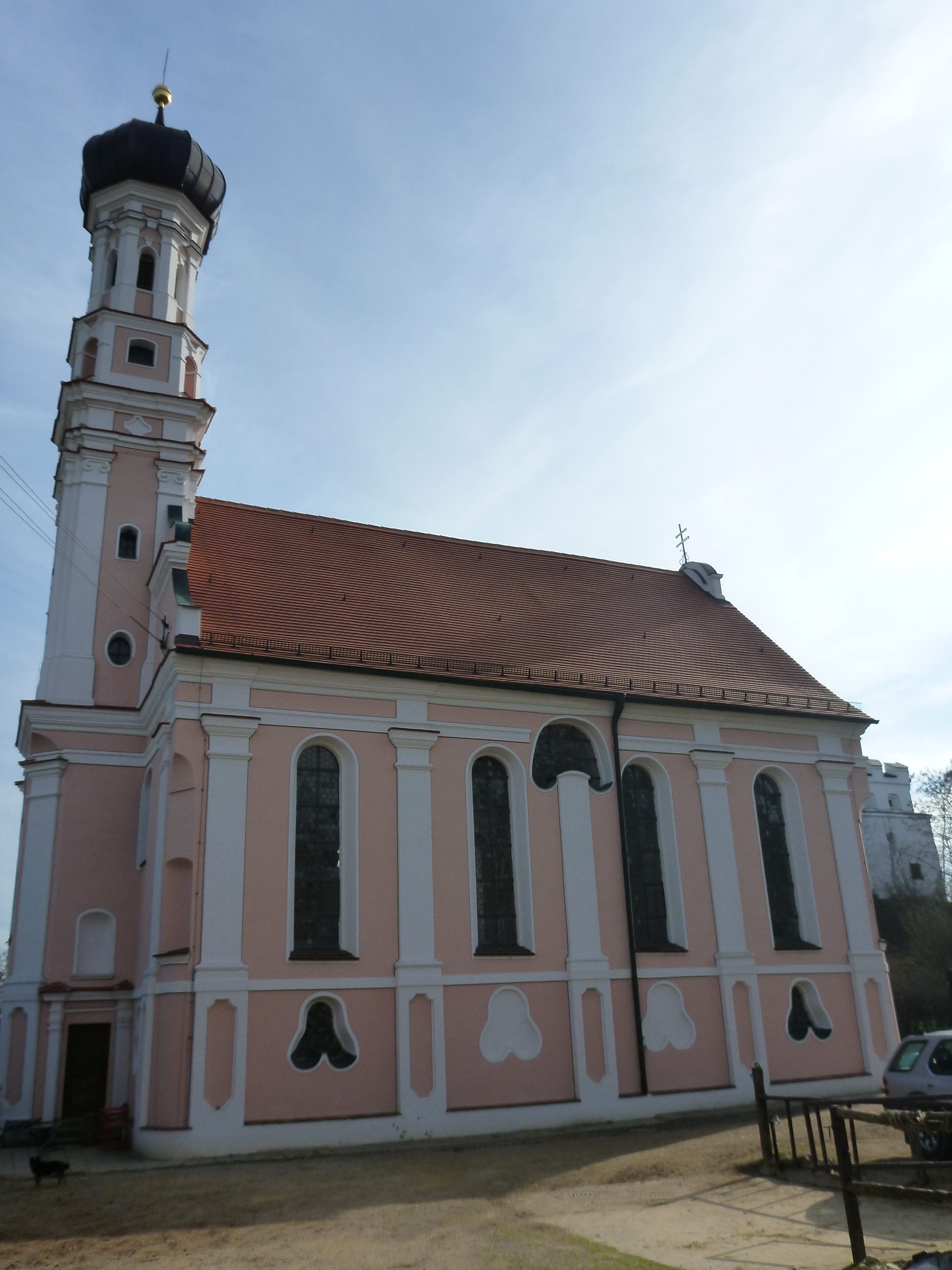 Katholische Schloßkapelle St. Johannes der Täufer, einheitlicher Barockbau, 1738/39 von Simon Rothmiller; mit Ausstattung.